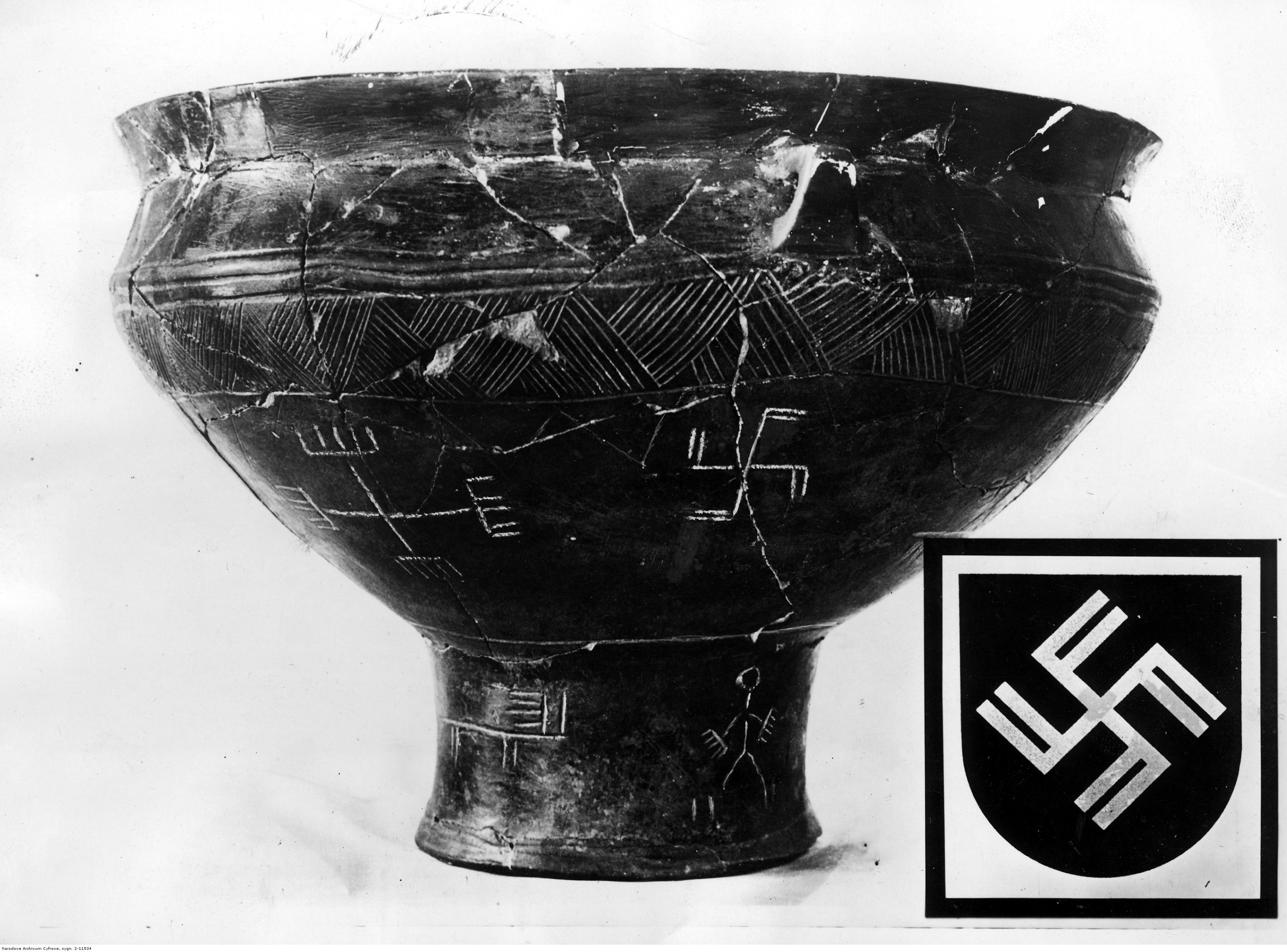 "Germańska urna i herb miasta Łodzi (Litzmannstadt)" 1941